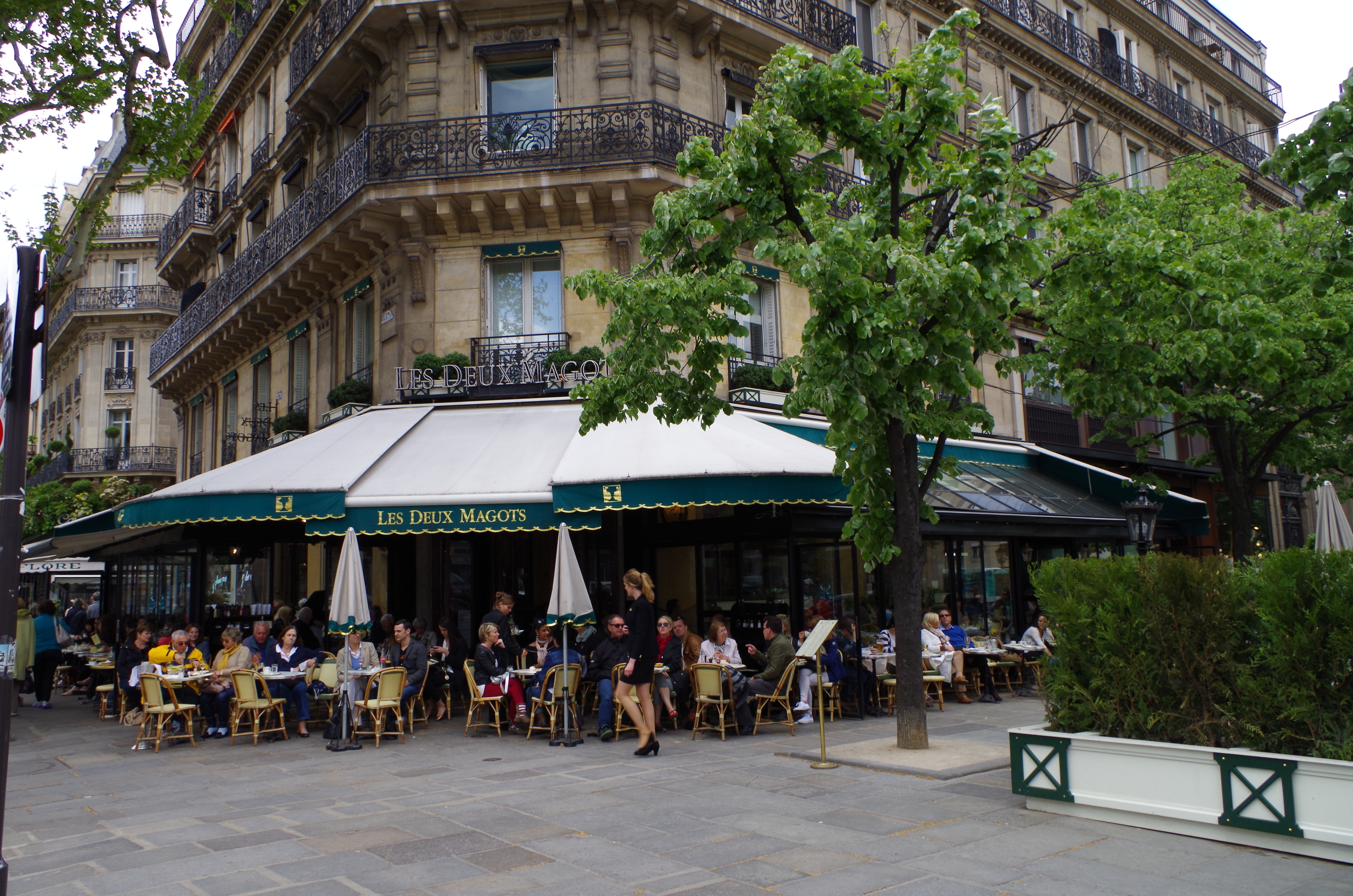 Les deux Magots - Boulevard Saint-Germain